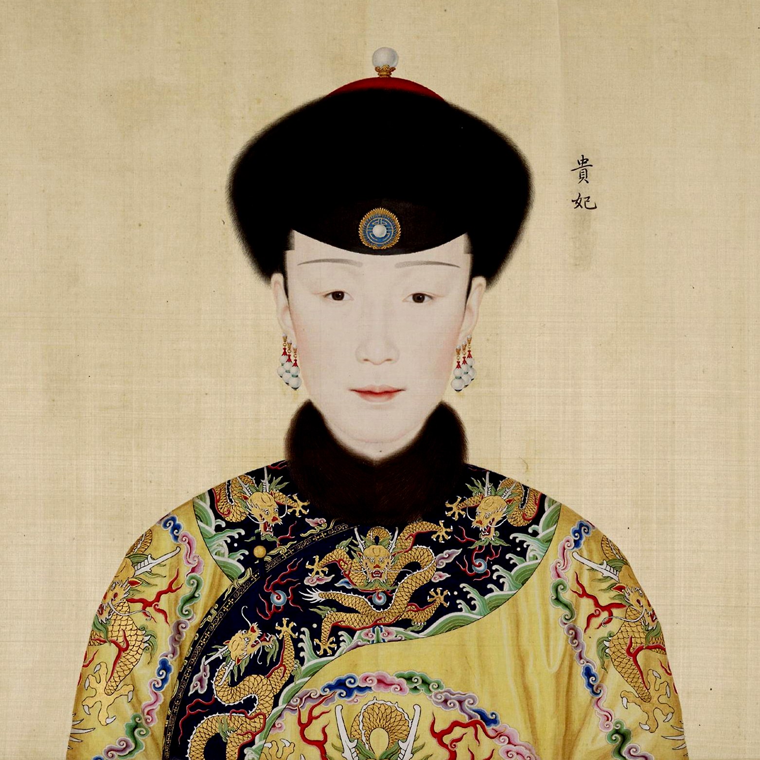 清高宗乾隆帝后妃肖像